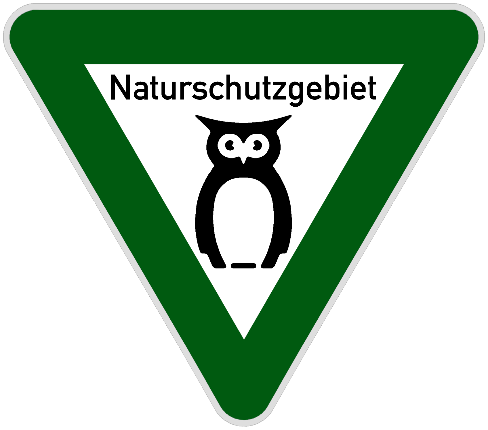 Das 1996 für das Bundesland Niedersachsen entwickelte Naturschutz-Schild.